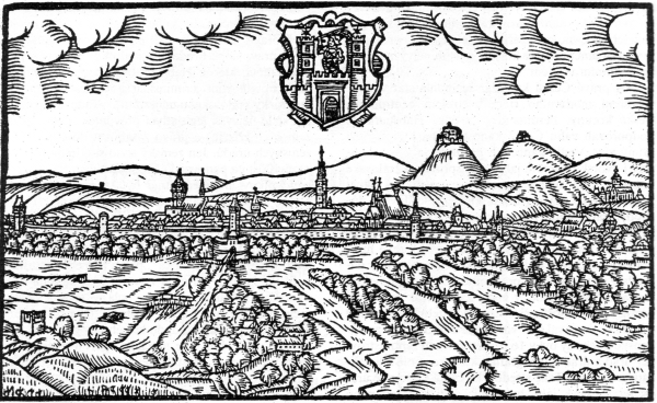 Uherské Hradiště podle Willenberga, konec 16. století